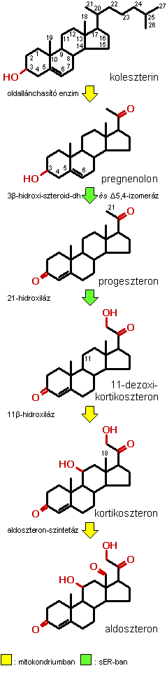 Aldoszteron szintézisének folyamata képletekkel. (Felhasznált programok: MDL ISIS Draw 2.5, Microsoft Office PowerPoint 2003)